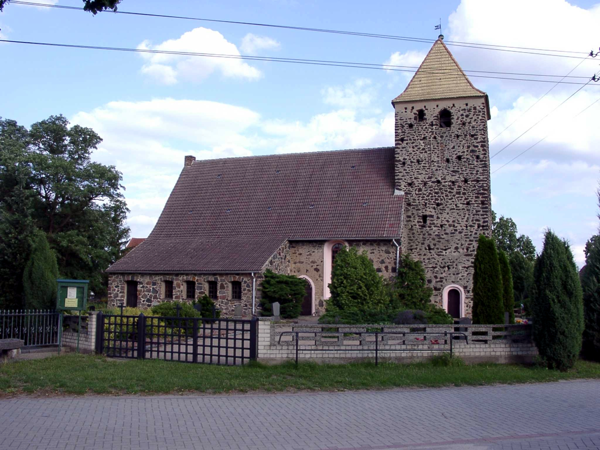 Wiederau